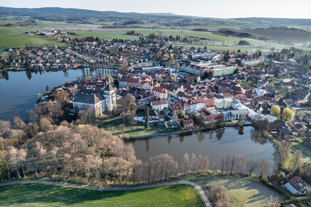 Letecký snímek Rožmitálu pod Třemšínem.